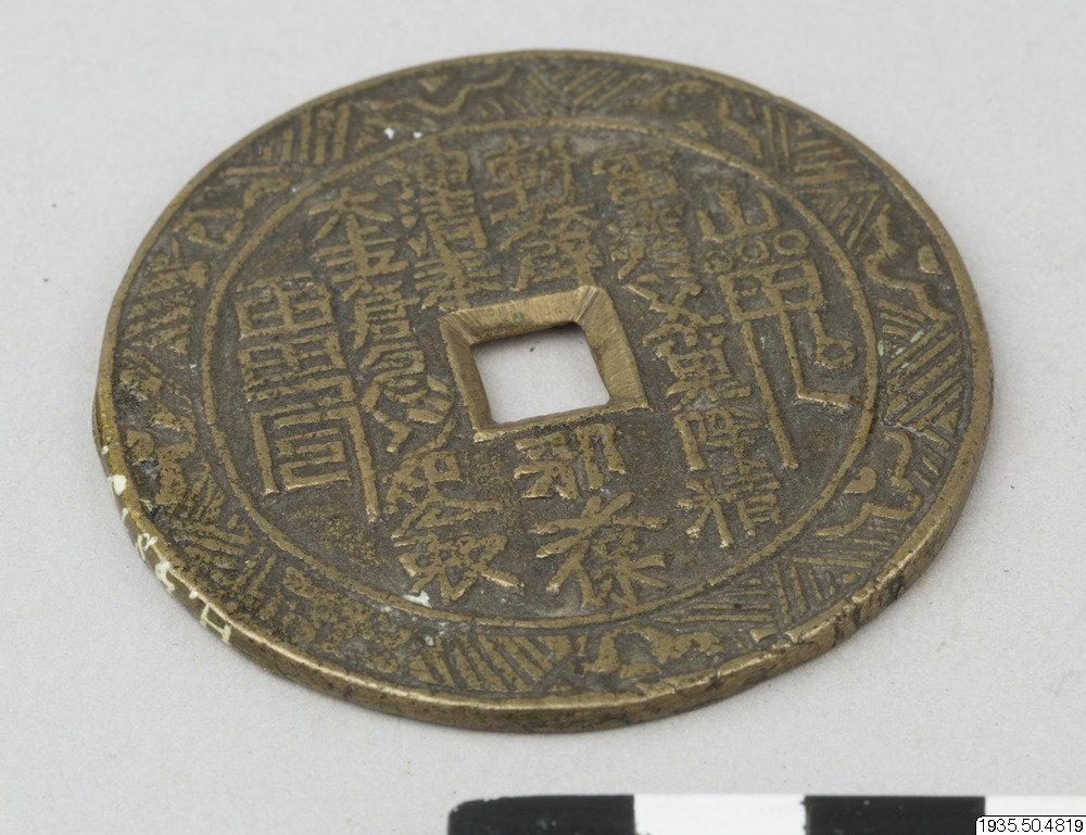 amulett 1935.50.4818 Hedinexpeditionen, fjärde centralasiatiska expeditionen (1927-1935)